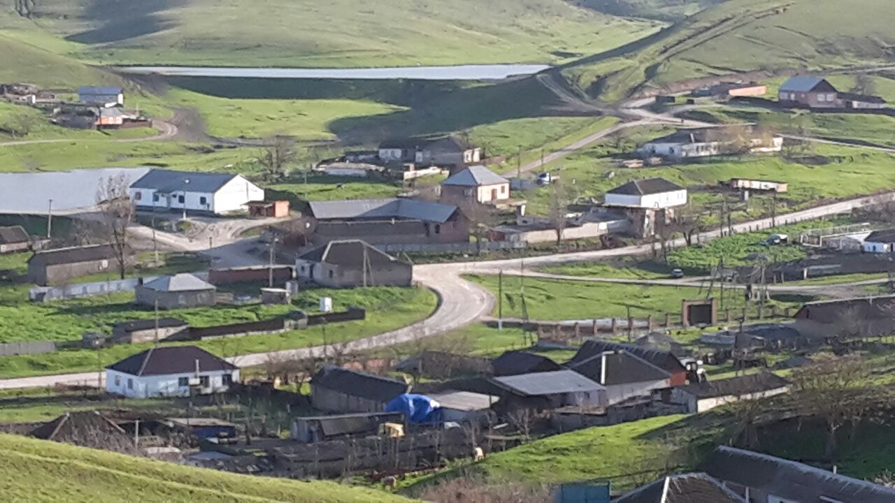 Нохчийн: Юьртан панорама